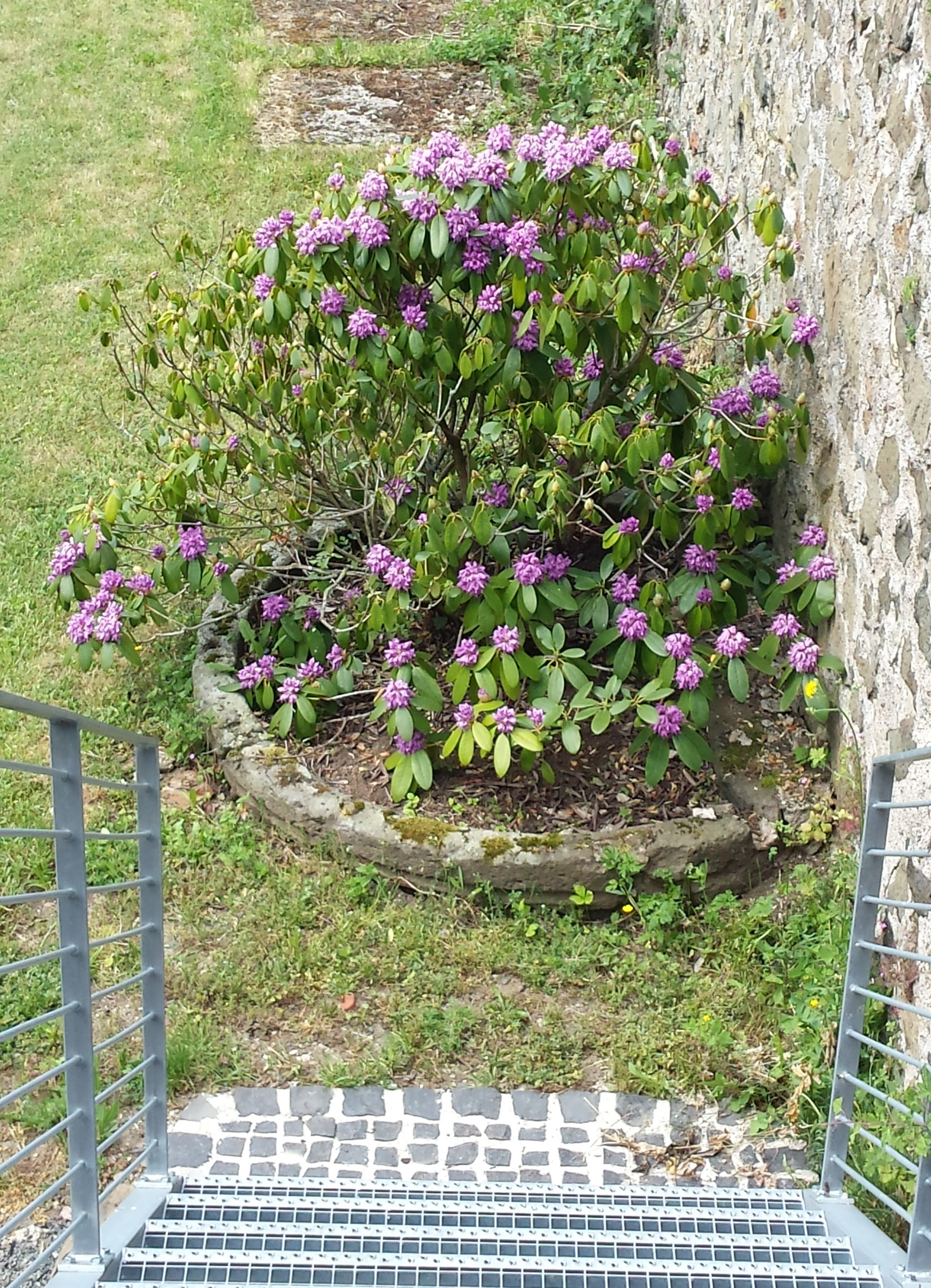 Vermutlicher ehemaliger Taufstein der KIrche Hohensolms im Renteigarten von Burg Hohensolms